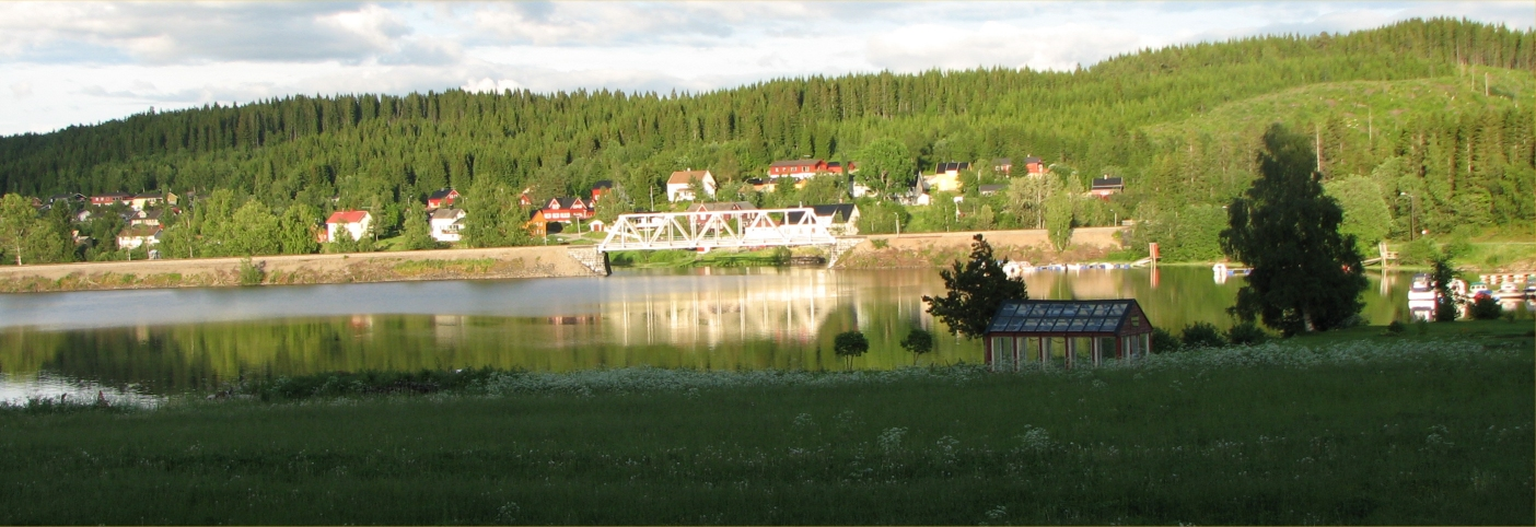 Sunnan, Steinkjer, Nord-Trøndelag